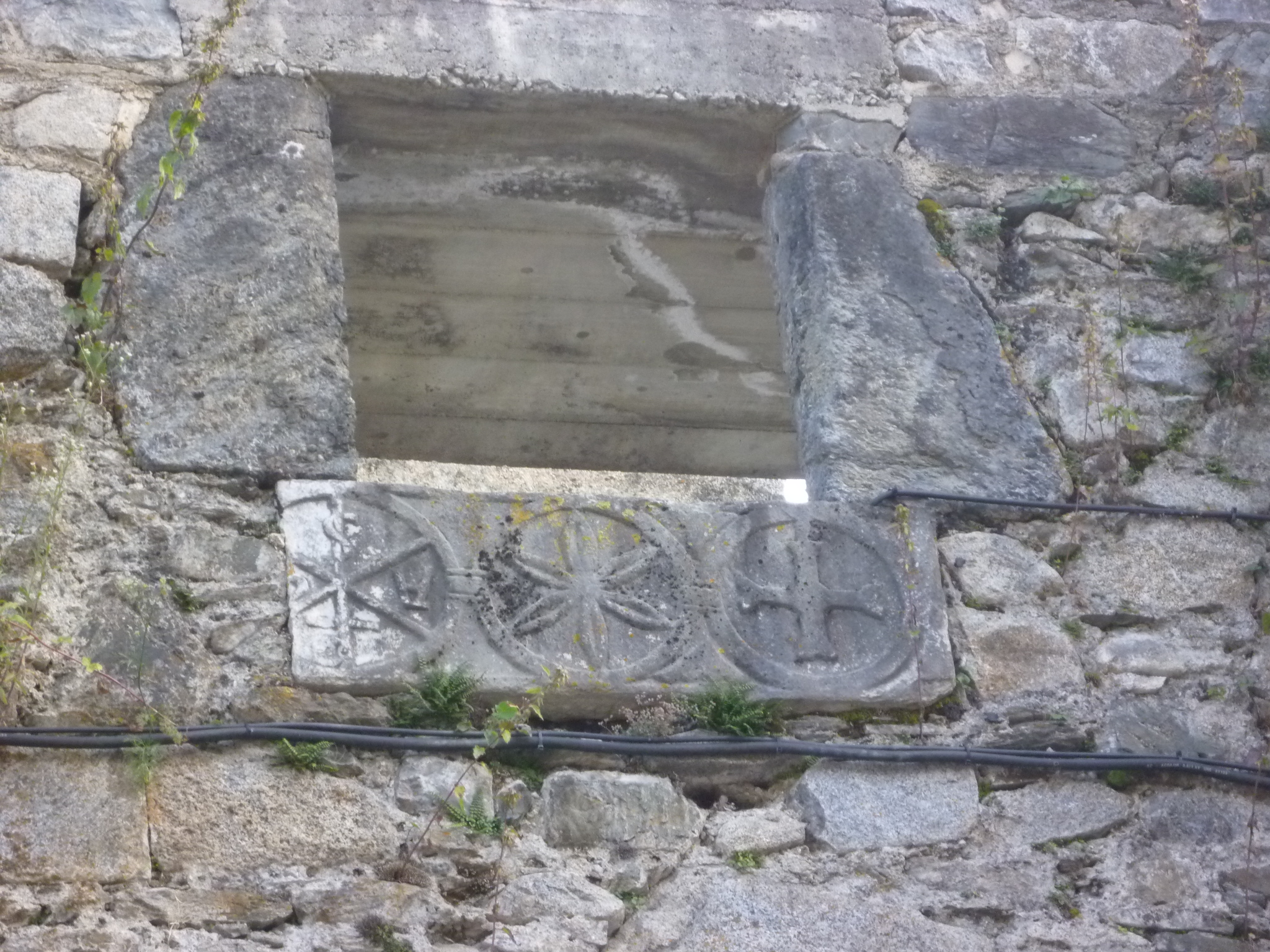 Església de Sant Sadurní (Vielha e Mijaran): detall d'una finestra